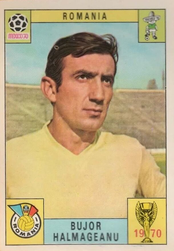 Bujor Hălmăgeanu